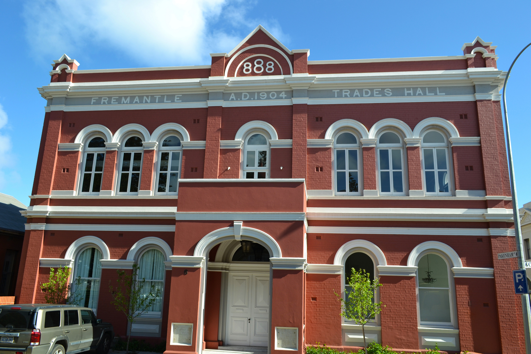 Former Trades Hall, Fremantle, Western Australia